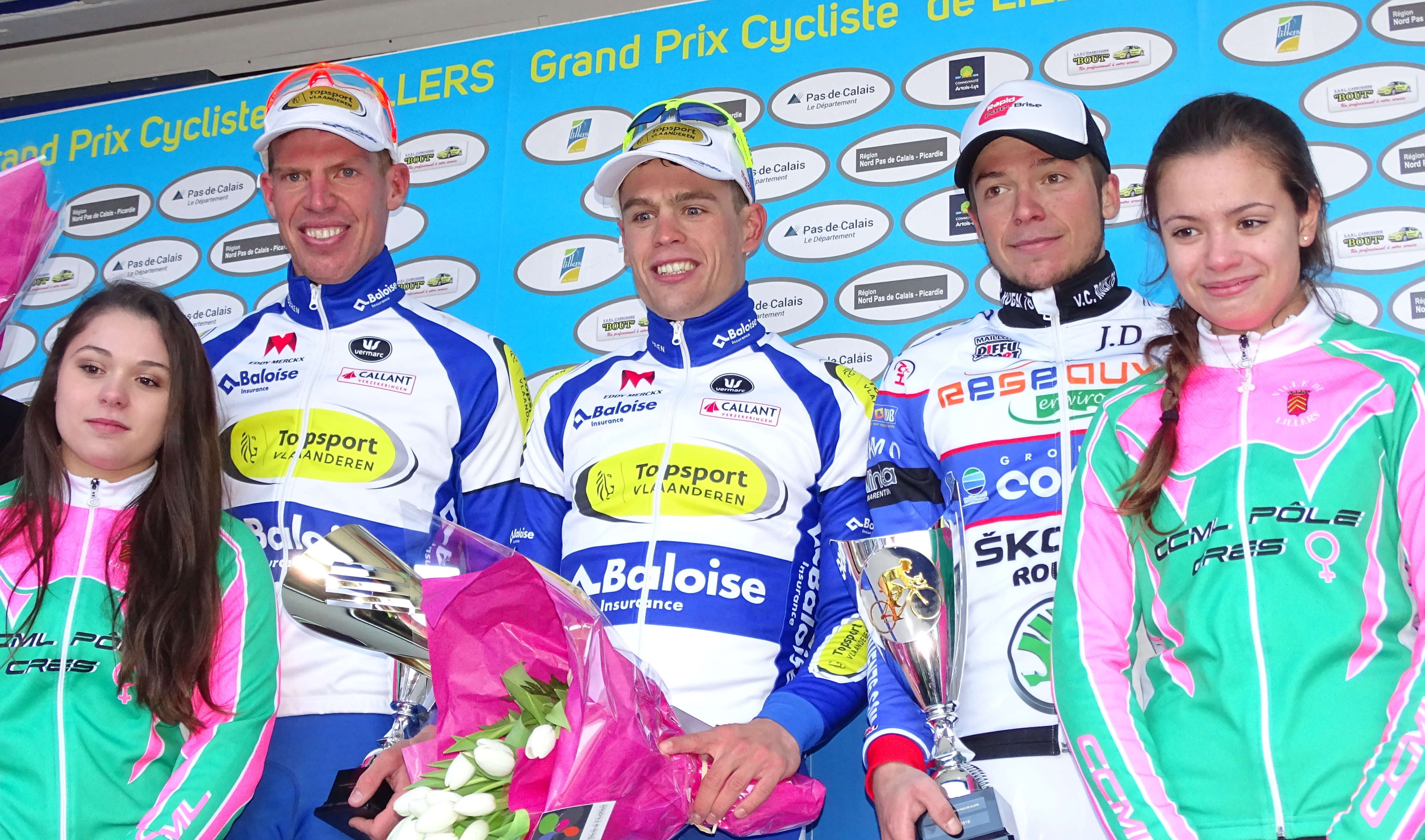 Reportage réalisé le dimanche 6 mars à l'occasion du départ et de l'arrivée du Grand Prix de Lillers-Souvenir Bruno Comini 2016 à Lillers, Pas-de-Calais, Nord-Pas-de-Calais, France.